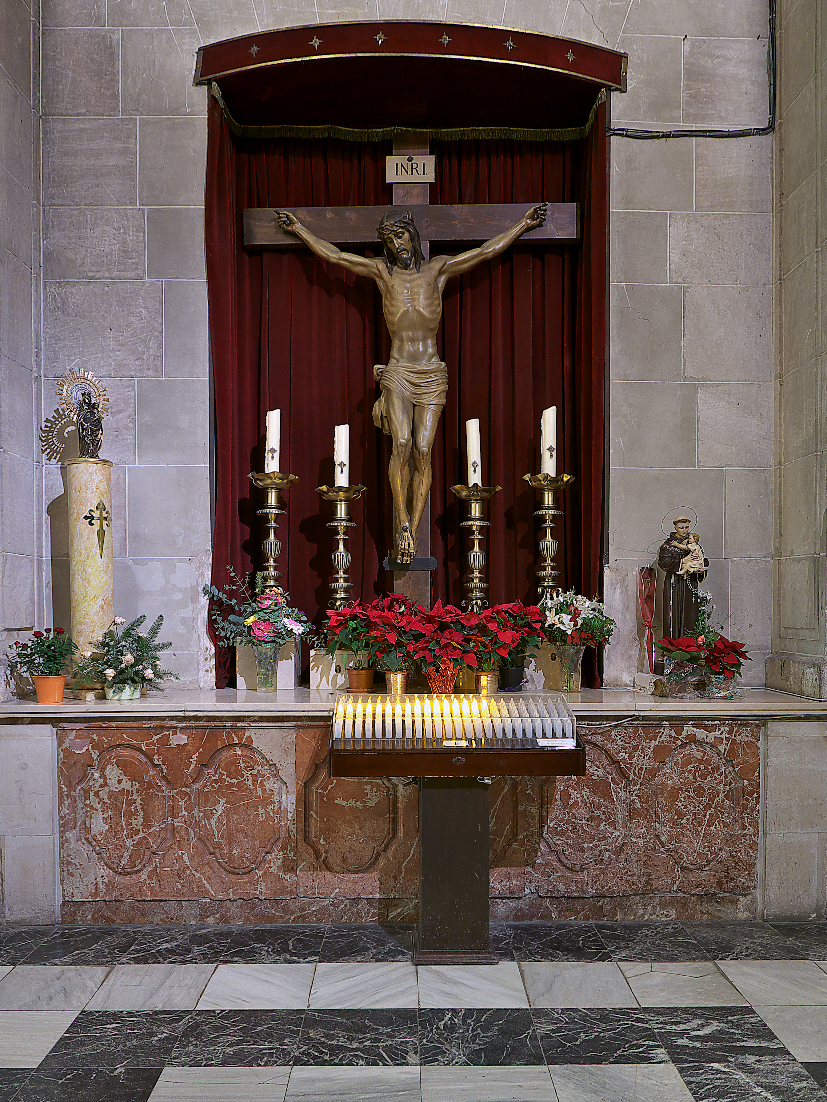 Basílica menor de Santa María (Elche). Imagen titular de la Cofradía del Santísimo Cristo de la Misericordia. Talla de Juan García Talens (1942)